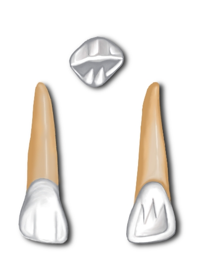 Μόνιμος πλάγιος τομέας άνω γνάθου